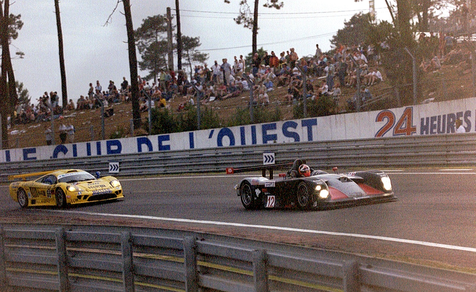 Panoz LMP 01 driven by Scott Maxwell, David Saelens & Benjamin Leuenberger leads Saleen S7R driven by Franz Konrad, Walter Brun & Toni Seiler at the Esses during the 2003 24 Hours of Le Mans